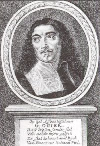 Portret van Willem Ogier, ets van Gaspar Bouttats voor de uitgave van de "De seven hooft-sonden" in 1682 naar een schilderij van Pieter Thijs van 1660.